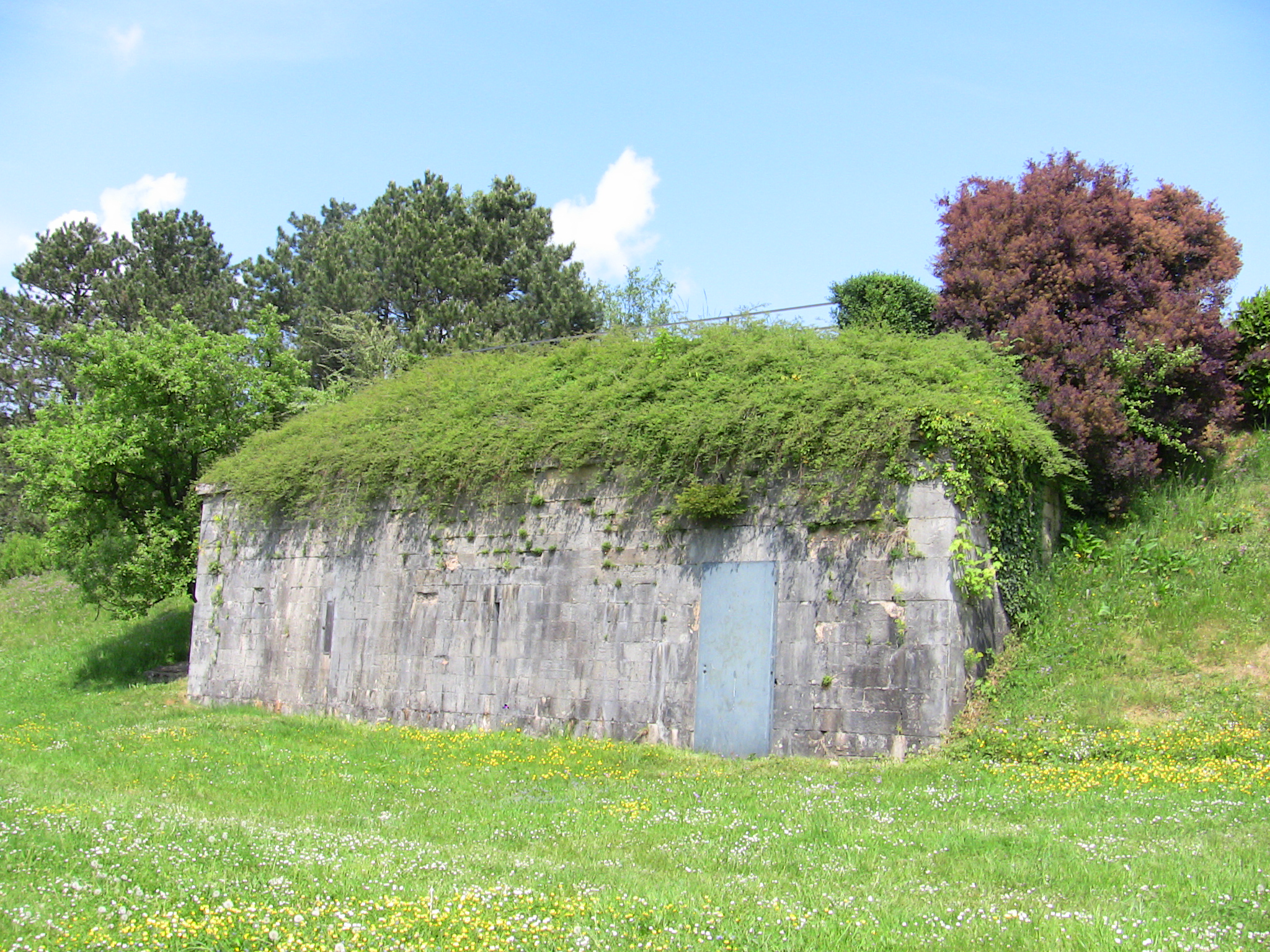 La casemate du fort de Beauregard à Besançon (Doubs, France).